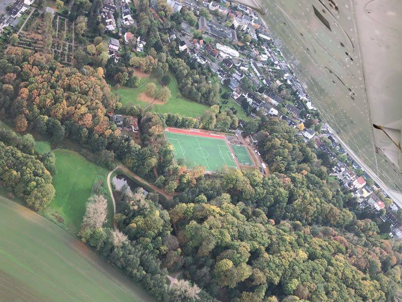 Luftbild nach dem Umbau